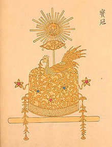 Hokan.jpg